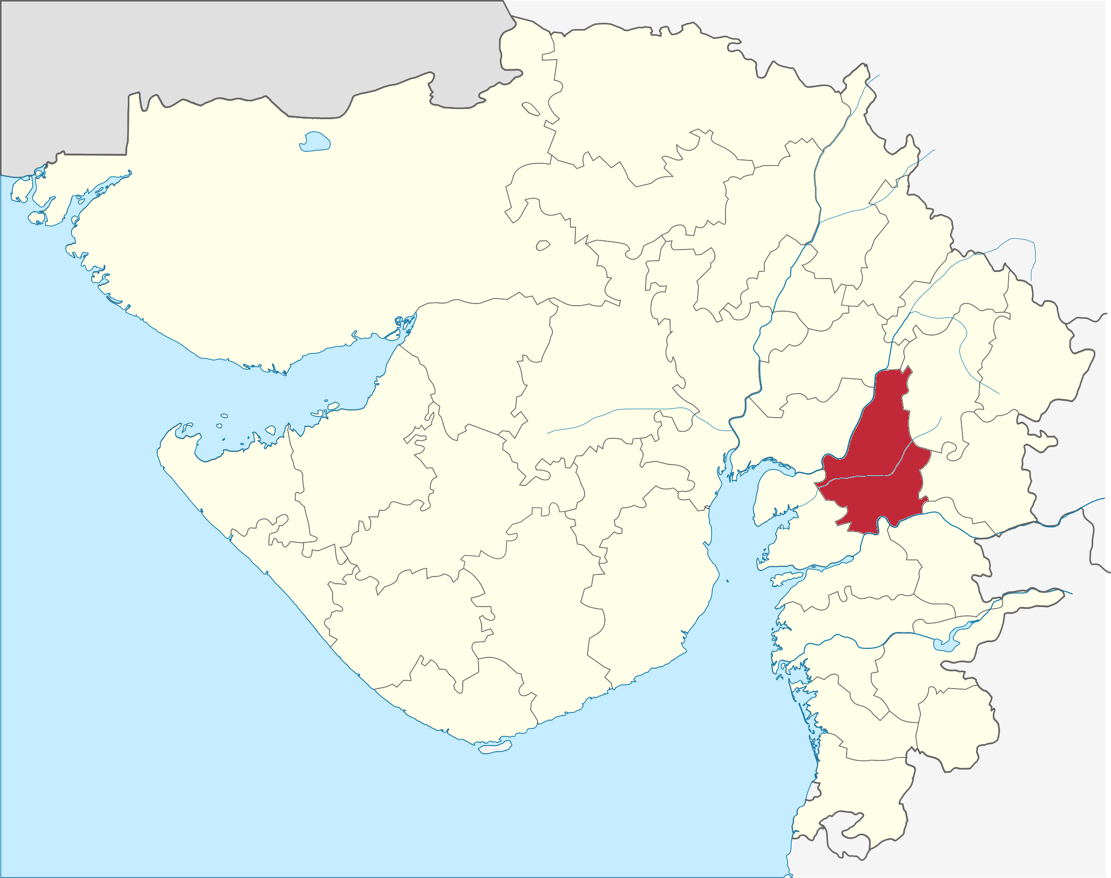 Distrito de Vadodara en Gujarat